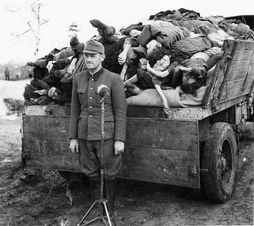 "Der gefangene SS-Obersturmführer Franz Hößler (4.2.1906 in Oberdorf - 13.12.1945 in Hameln), steht vor einem Mikrophon, hinter ihm ein mit Leichen verstorbener Häftlinge beladener Lastwagen-Anhänger. Hößler war in den Konzentrationslagern Dachau, Auschwitz und Bergen-Belsen tätig; ab Februar 1945 Schutzhaftlagerführer im Konzentrationslager Mittelbau-Dora; Kommandant des Kasernenlagers Bergen-Belsen; am 17.11.1945 zum Tode verurteilt und am 13.12.1945 im Zuchthaus Hameln hingerichtet." Bildunterschrift bei Gedenkstätte Mittelbau-Dora